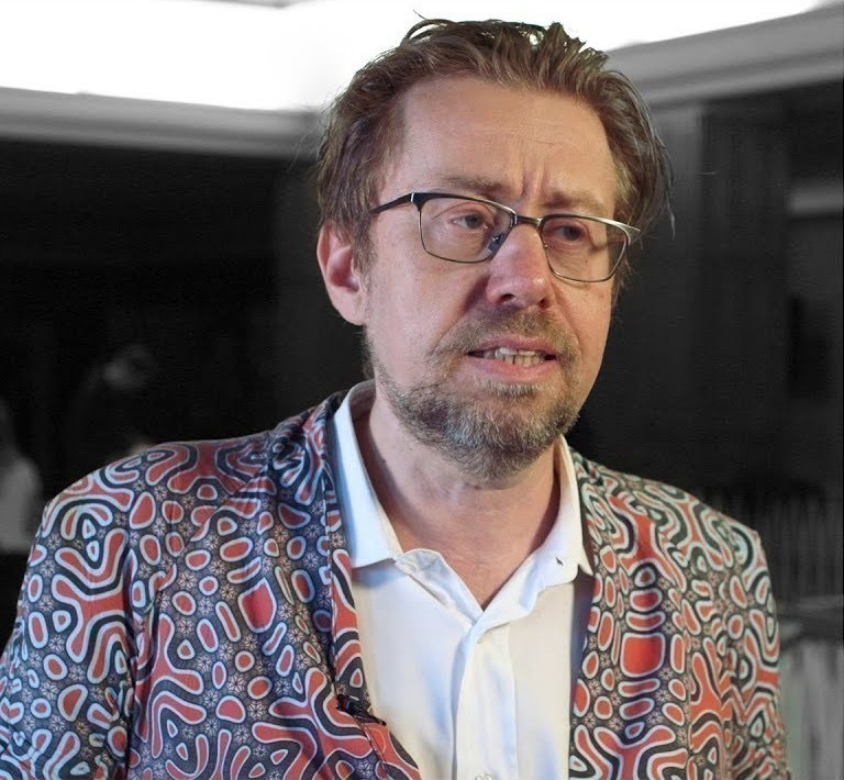 Evolution isn't over! The rapid progress of technologies means that that humanity is connecting into some type of global brain, says Daniel Pinchbeck, Executive ...